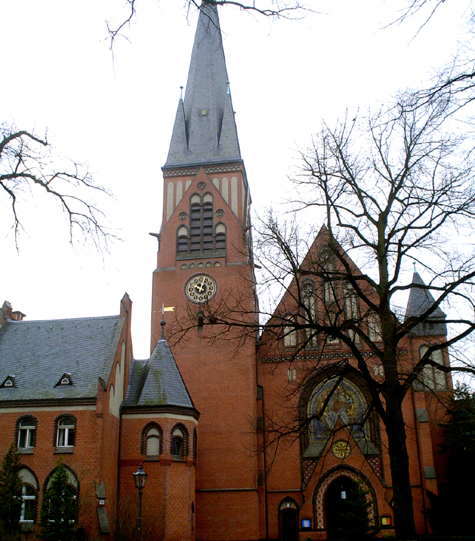 Auenkirche in Berlin Wilmersdorf - Gesamtansicht der Fassade mit Turm und Portal